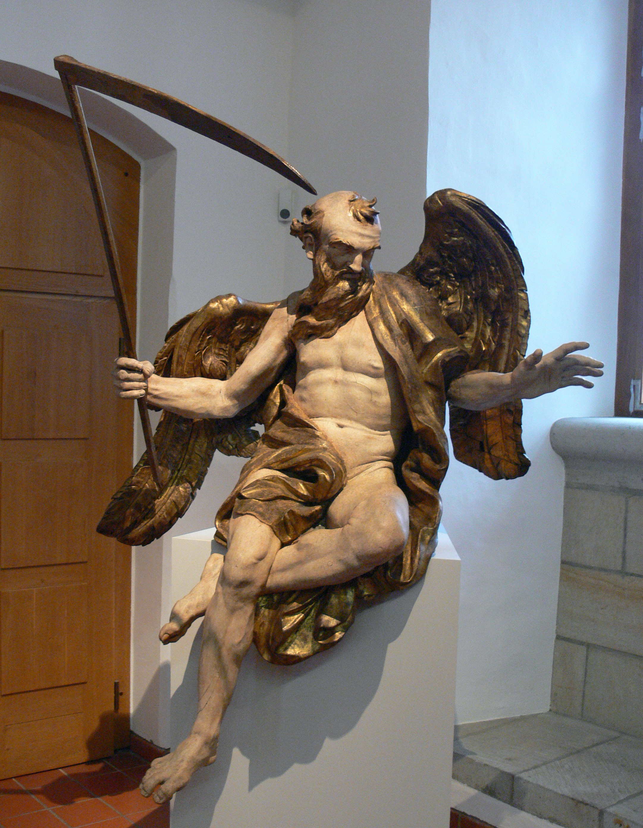 Umkreis des George Heermann (um 1630–1700): Chronos, um 1696, Laubholz mit farbiger Fassung, vom Grabmal des Amtmanns Salomon Siegel in der Jakobikirche in Chemnitz